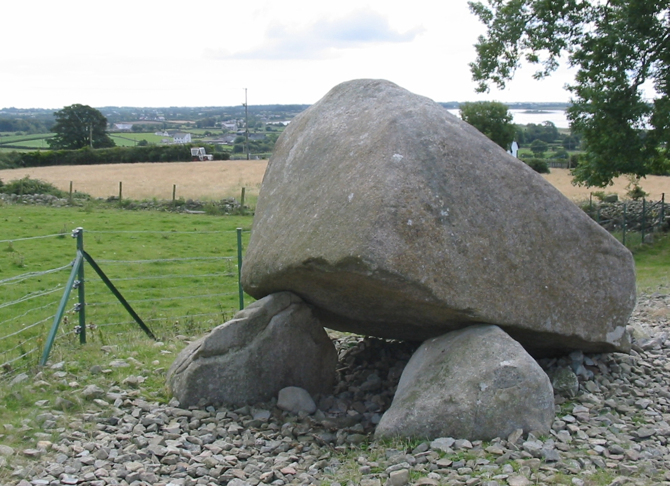 Kilfeaghan dolmen